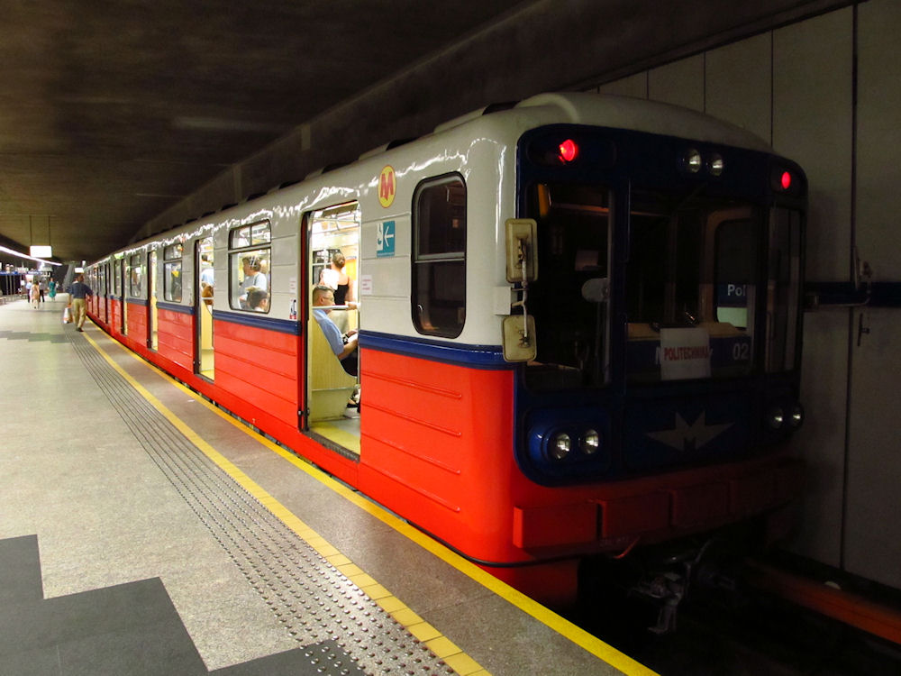 Stacja Politechnika